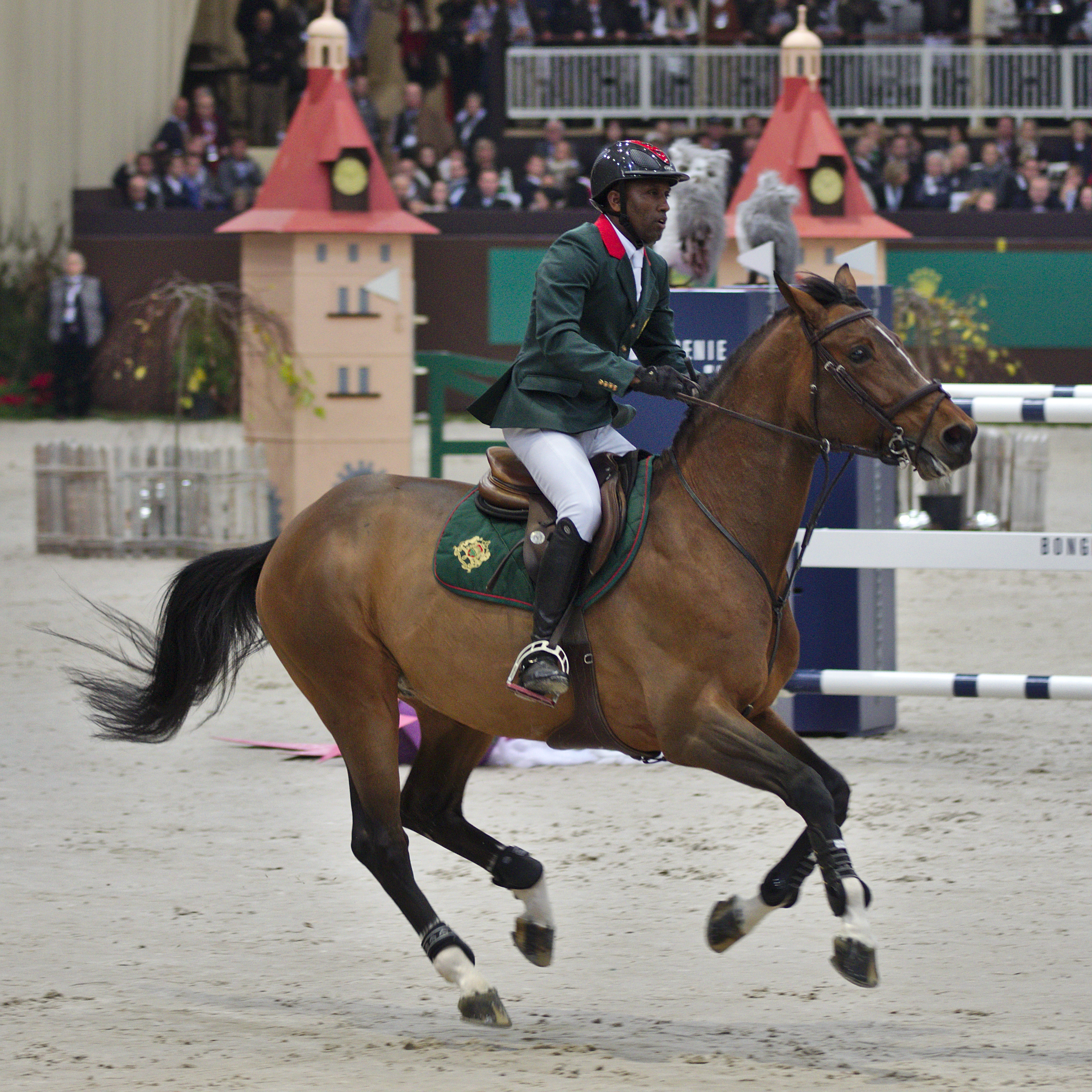 CHI Genève 2013 - 20131213 - PAbdelkebir Ouaddar et Quickly de Kreisker